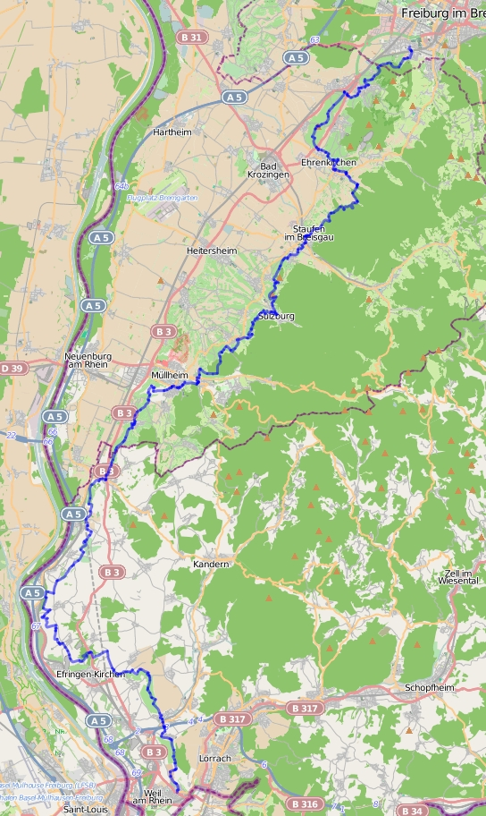 Karte des Markgräfler Wiiwegli, ein Fernwanderweg des Schwarzwaldvereins im Markgräflerland.